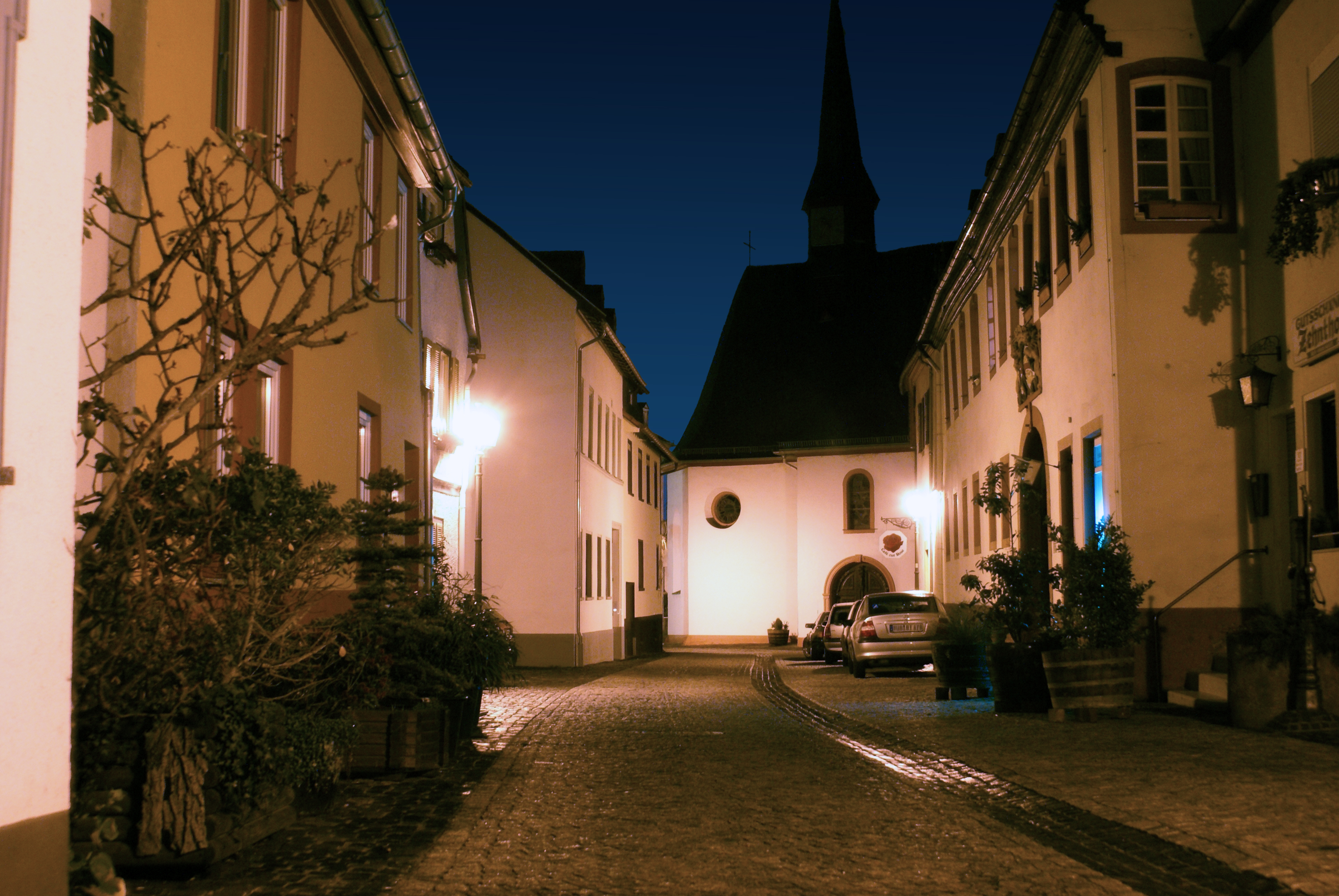 Kirchgasse in Niederwalluf, rechts der ehemalige Stadioner Hof, im Hintergrund die katholische Pfarrkirche St. Johannes der Täufer